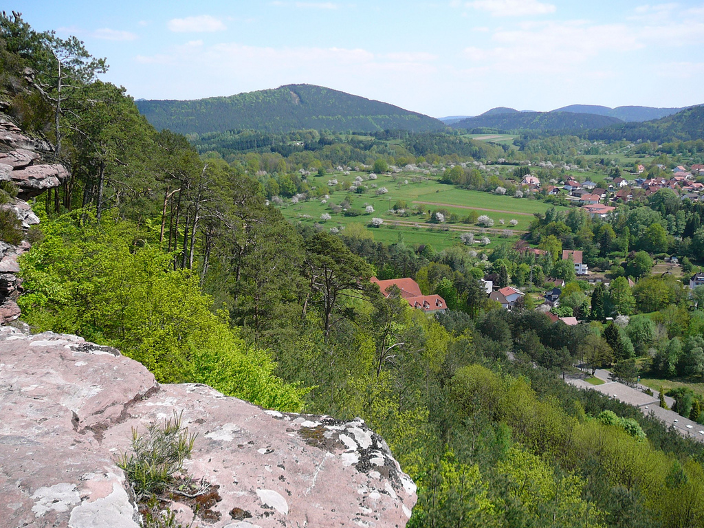 Hauenstein und den Wasgau mit Blcik Nedingfelsen bei Hauenstein